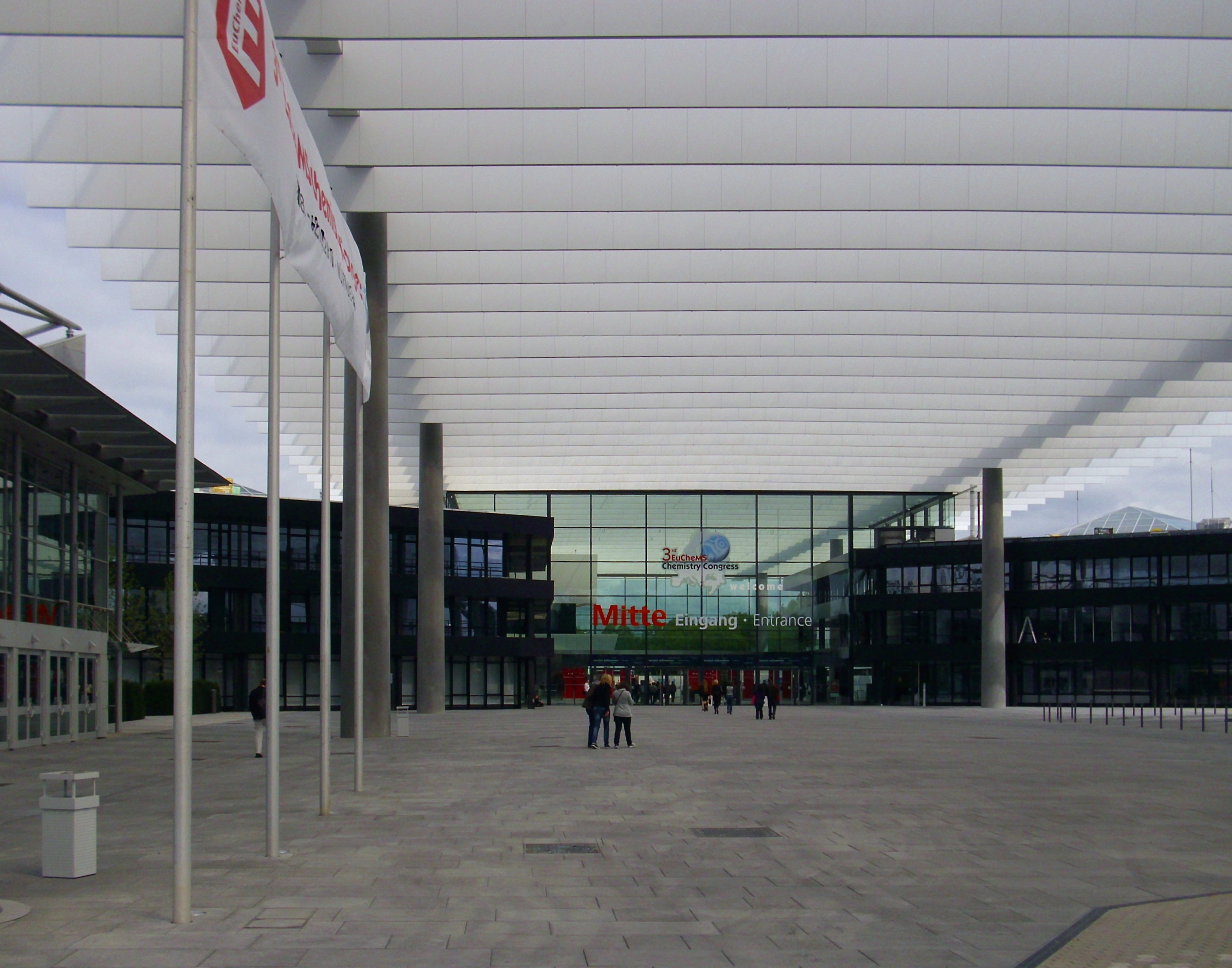 Eingang Mitte des Nürnberger Messezentrums